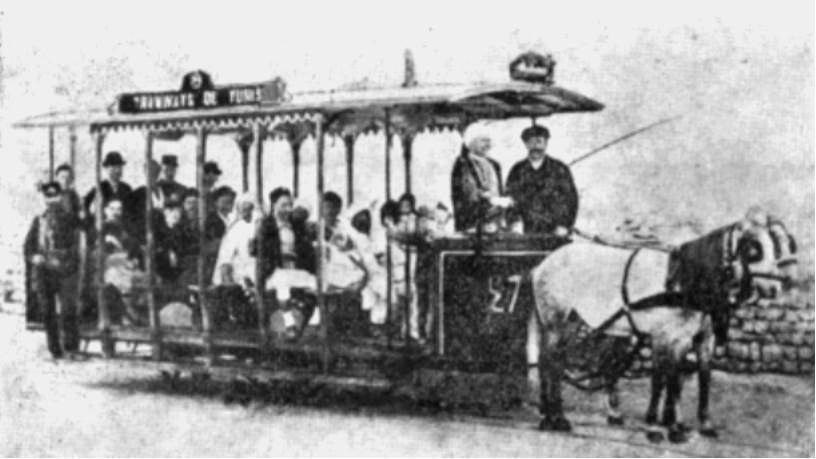 Tramway à chevaux à Tunis en 1882, Tunisie